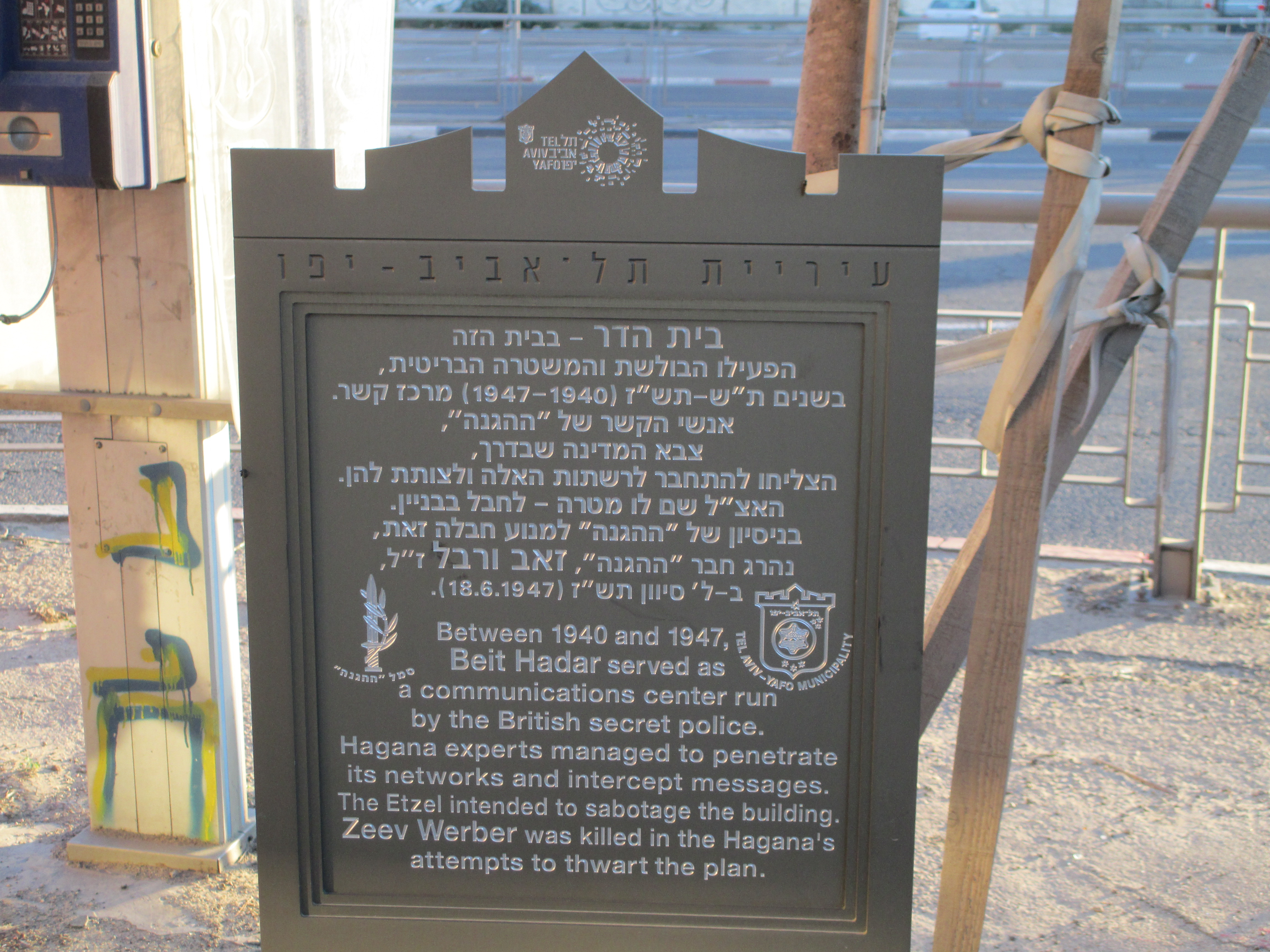 לוחית זיכרון של ההגנה ב"בית הדר" בתל אביב